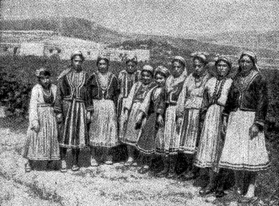 Курдские женщины в Советской Армении